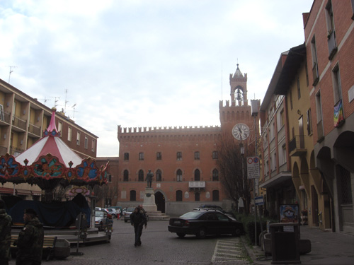 Budrio: Piazza Quirico Filopanti e sullo sfondo il Palazzo Municipale o "Palazzo Torre".